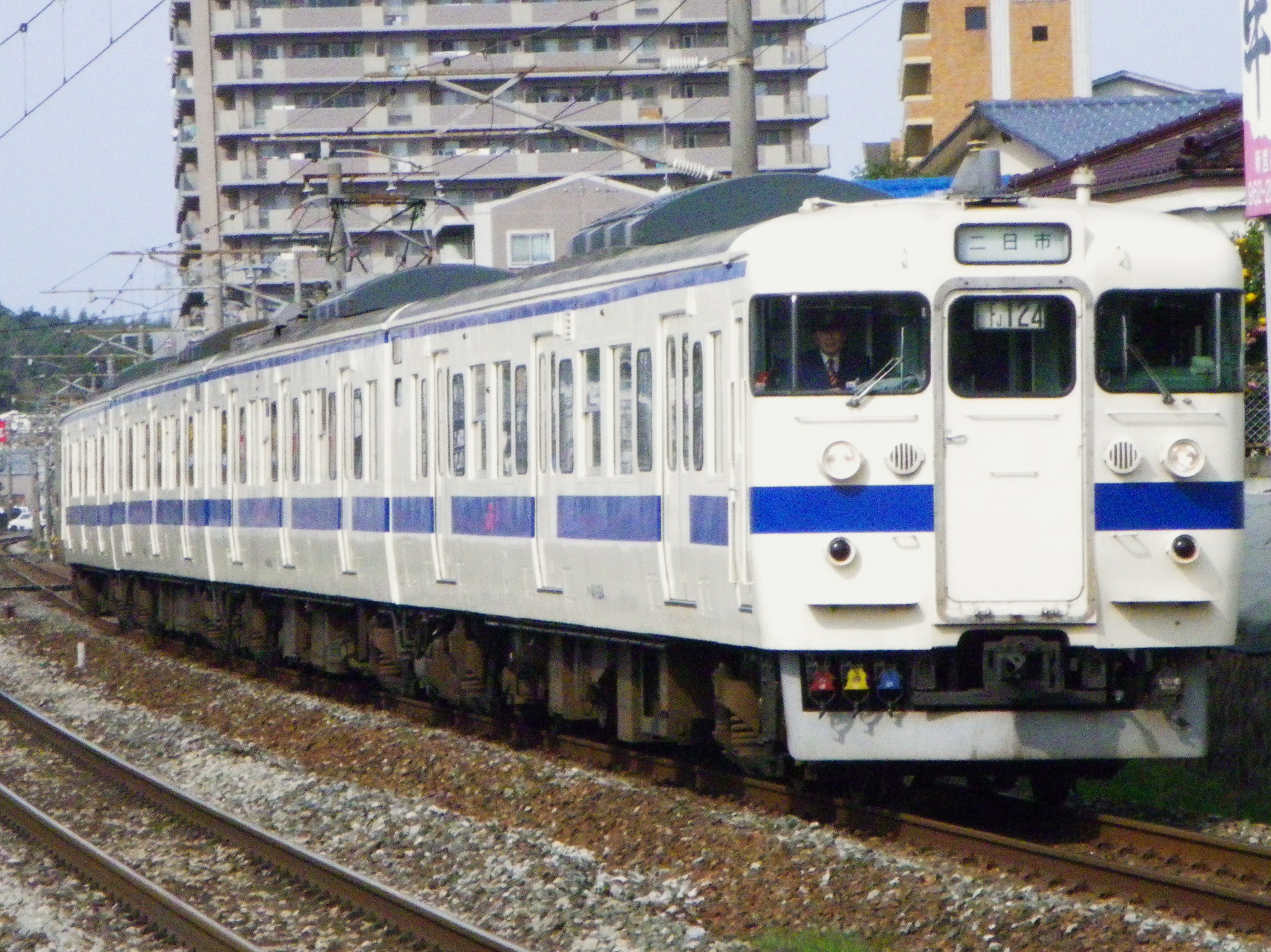 ４１５系 更新車 福工大前～九産大前